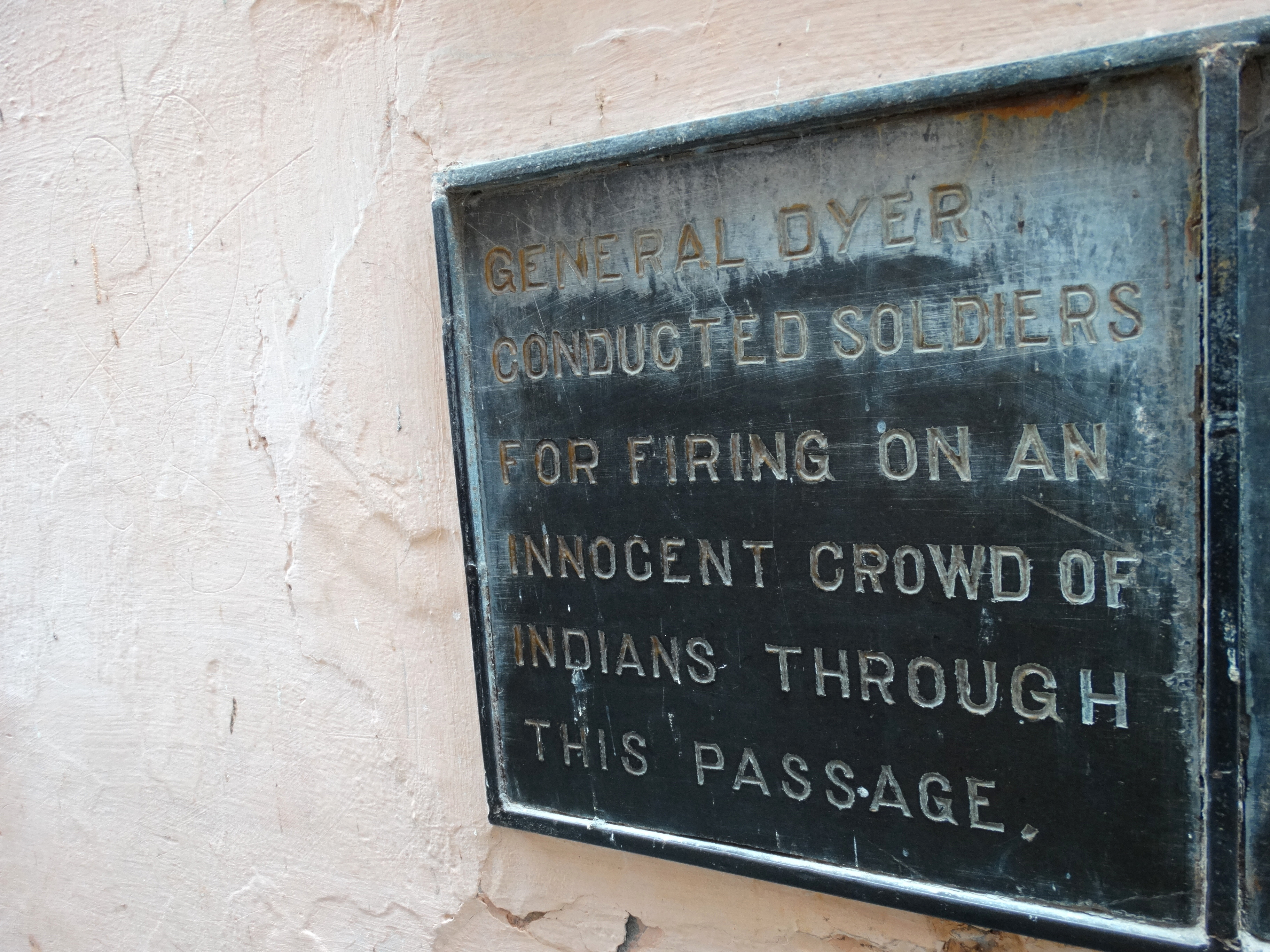 Plaque in Passageway Memorializing 1919 Amritsar Massacre - Jallianwala Bagh - Amritsar - Punjab - India